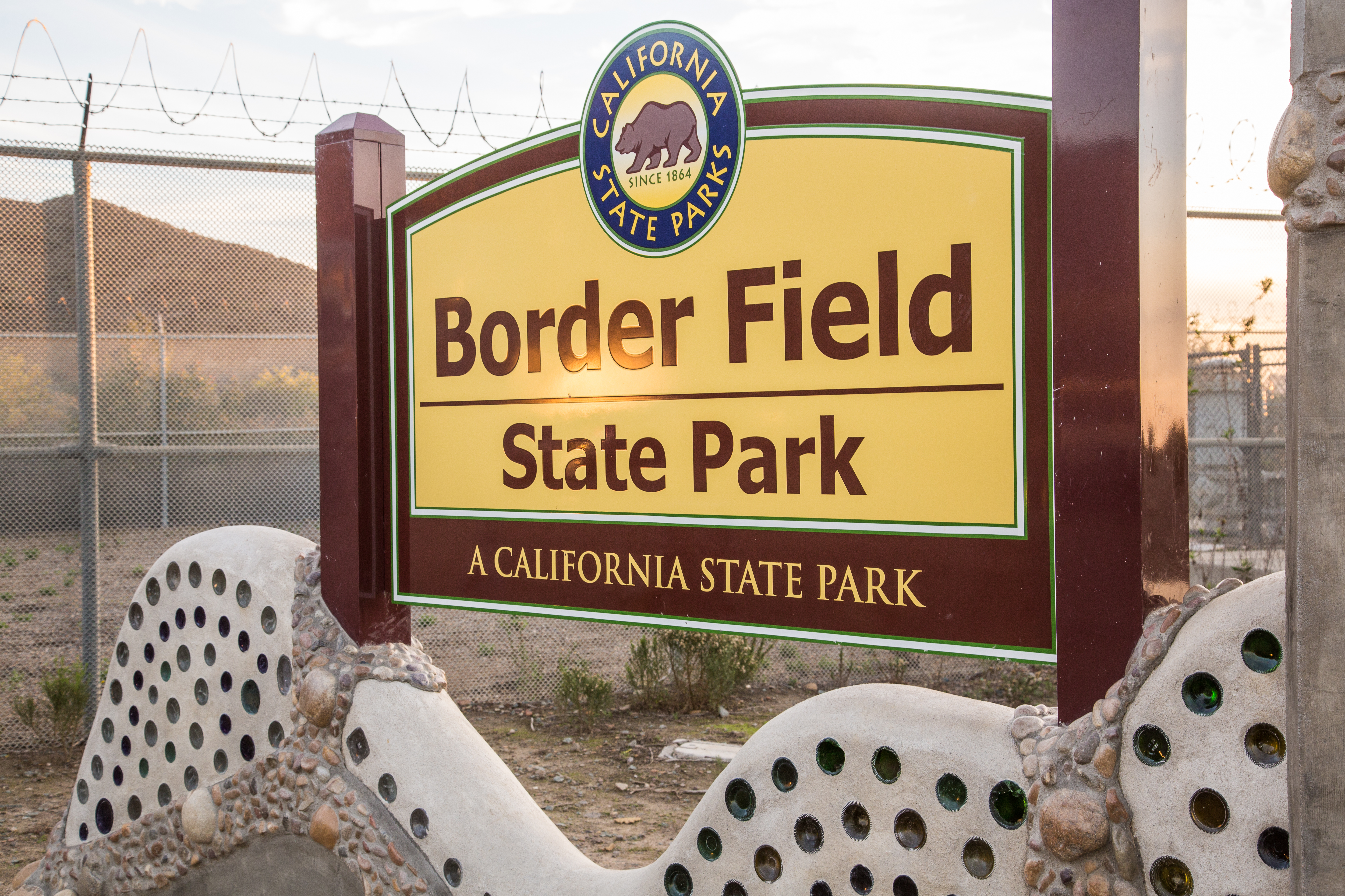 San Diego, California - USA/Mexico border fence